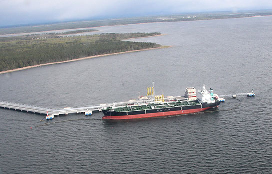 Владимир Путин принял участие в запуске в эксплуатацию первой очереди проекта «Север»